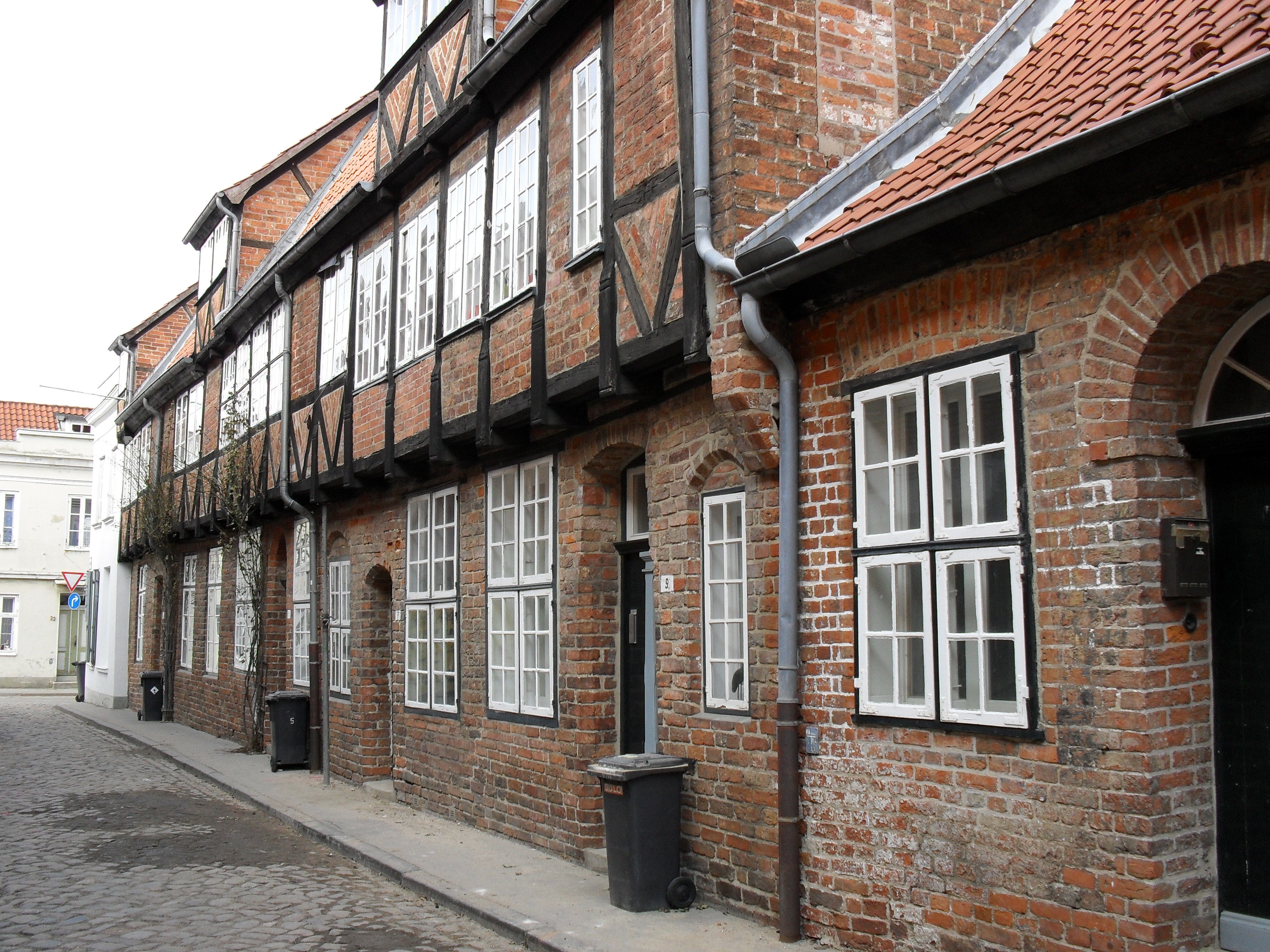 Die 1491 erbauten Häuser Düvekenstraße Nr. 1-3, 5, 7 und 9 in Lübeck